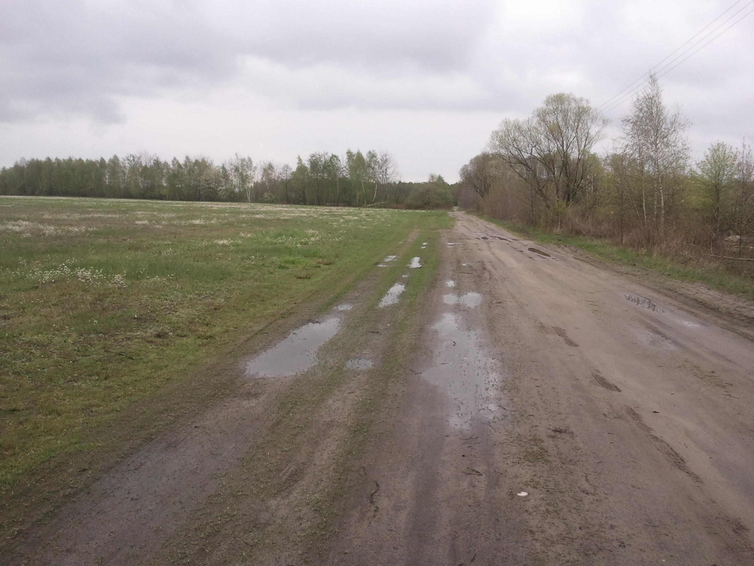 ul. Leśna w Kamionce